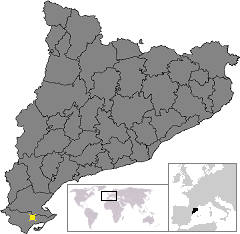 Localització d'Amposta . Location of Amposta in Catalonia.